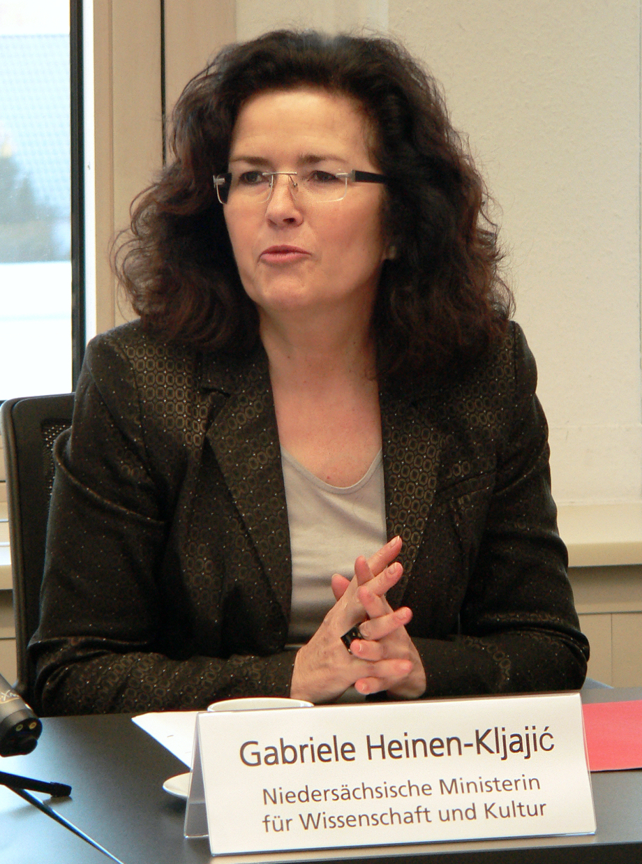 Gabriele Heinen-Kljajić bei der Pressekonferenz zur Wiedereinführung der Niedersächsischen Landeszentrale für politische Bildung